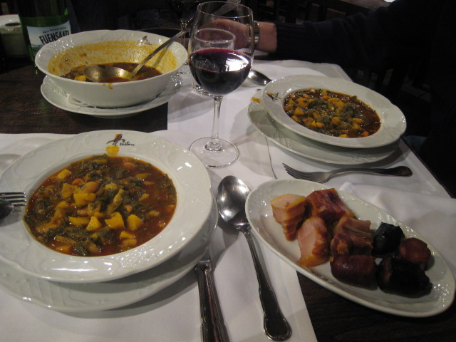 Pote asturianu con compango